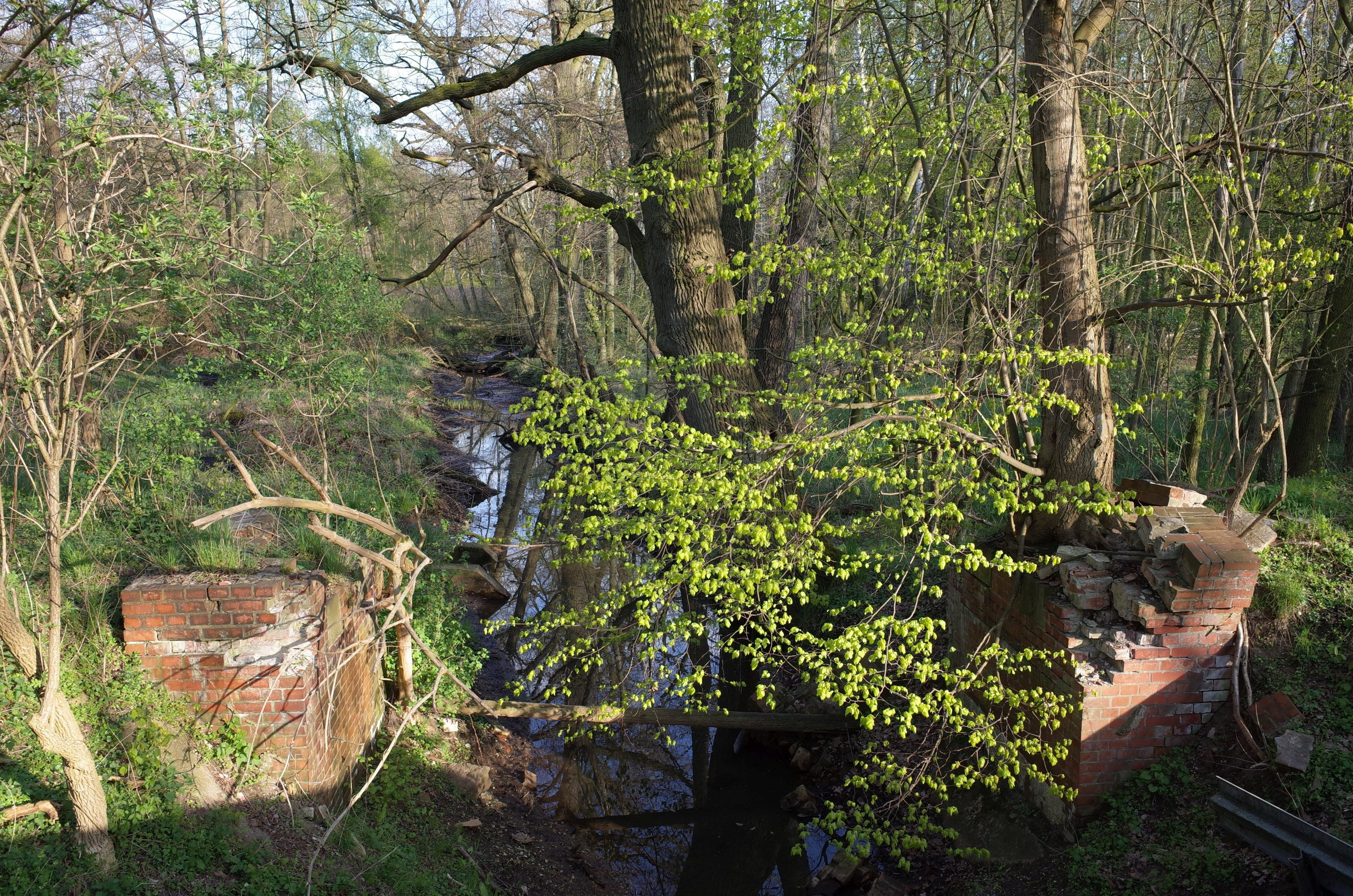 Dessau-Roßlau, Ortsteil Kochstedt. Ehemalige Brücke der Dessau-Radegast-Köthener Bahn (DRKB) am Rand des FFH-Gebiet Brambach und NSG Brambrach.